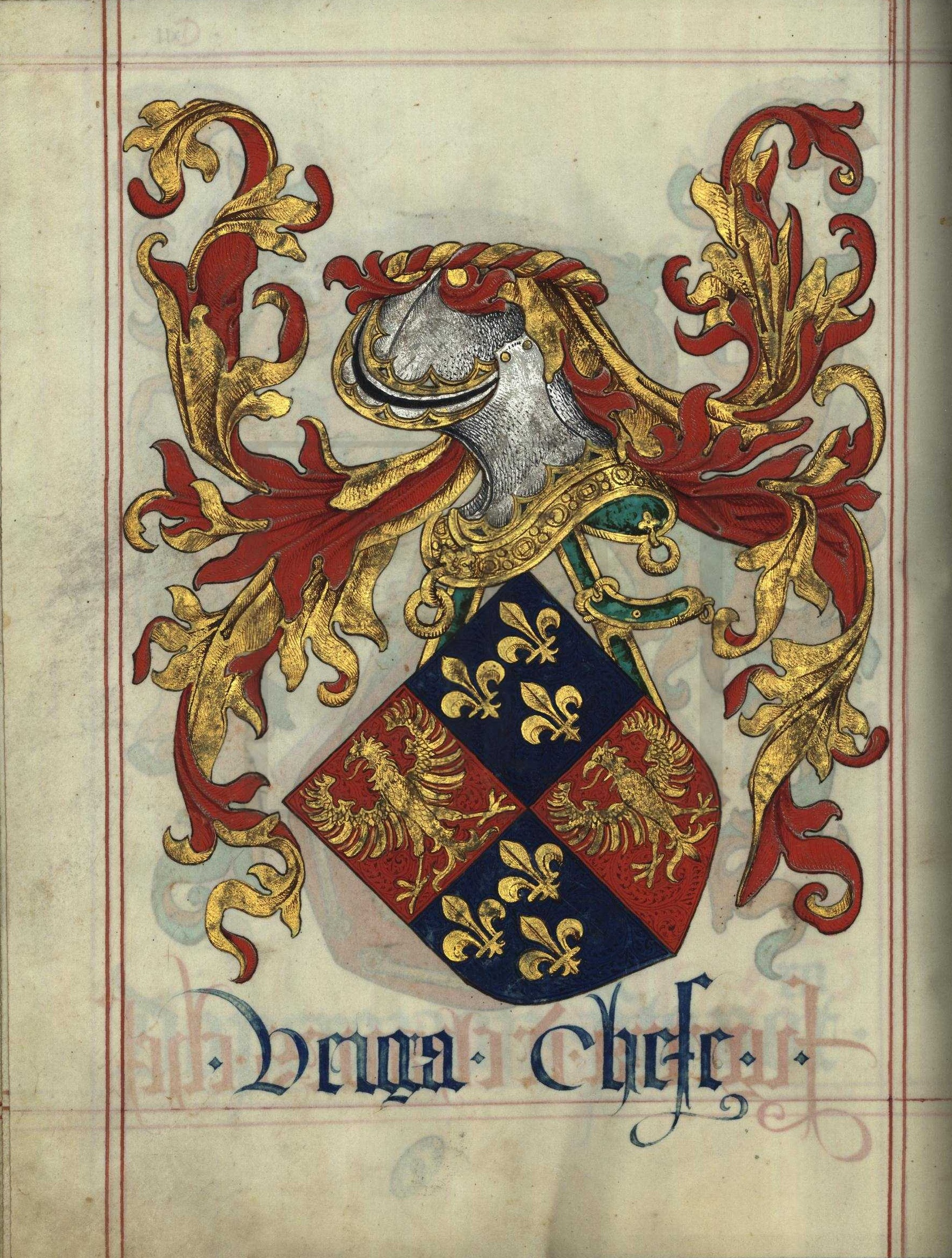 Livro do Armeiro-Mor, Veiga (fl 112v)